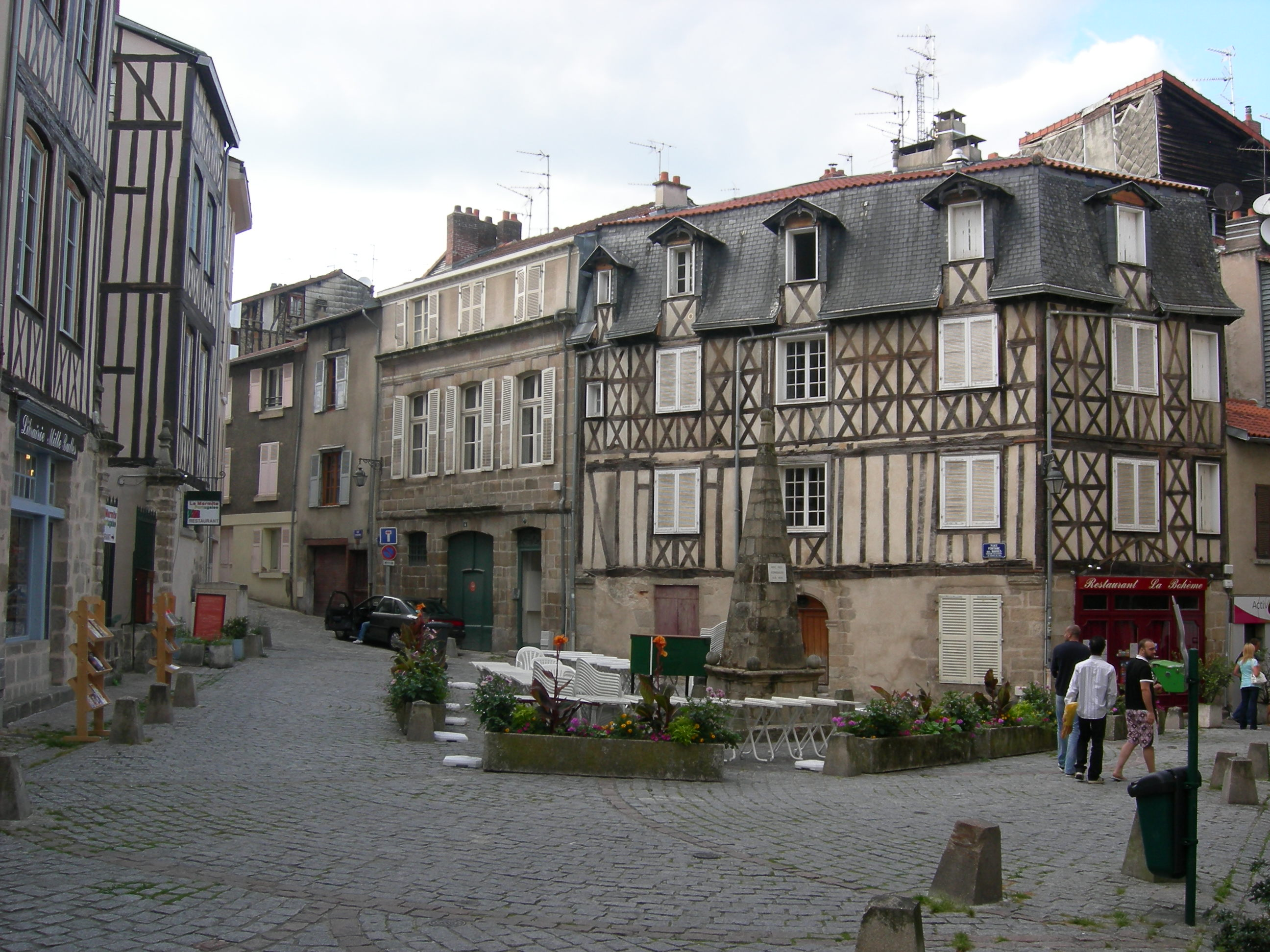 Place de la Fontaine des barres, Limoges, France.